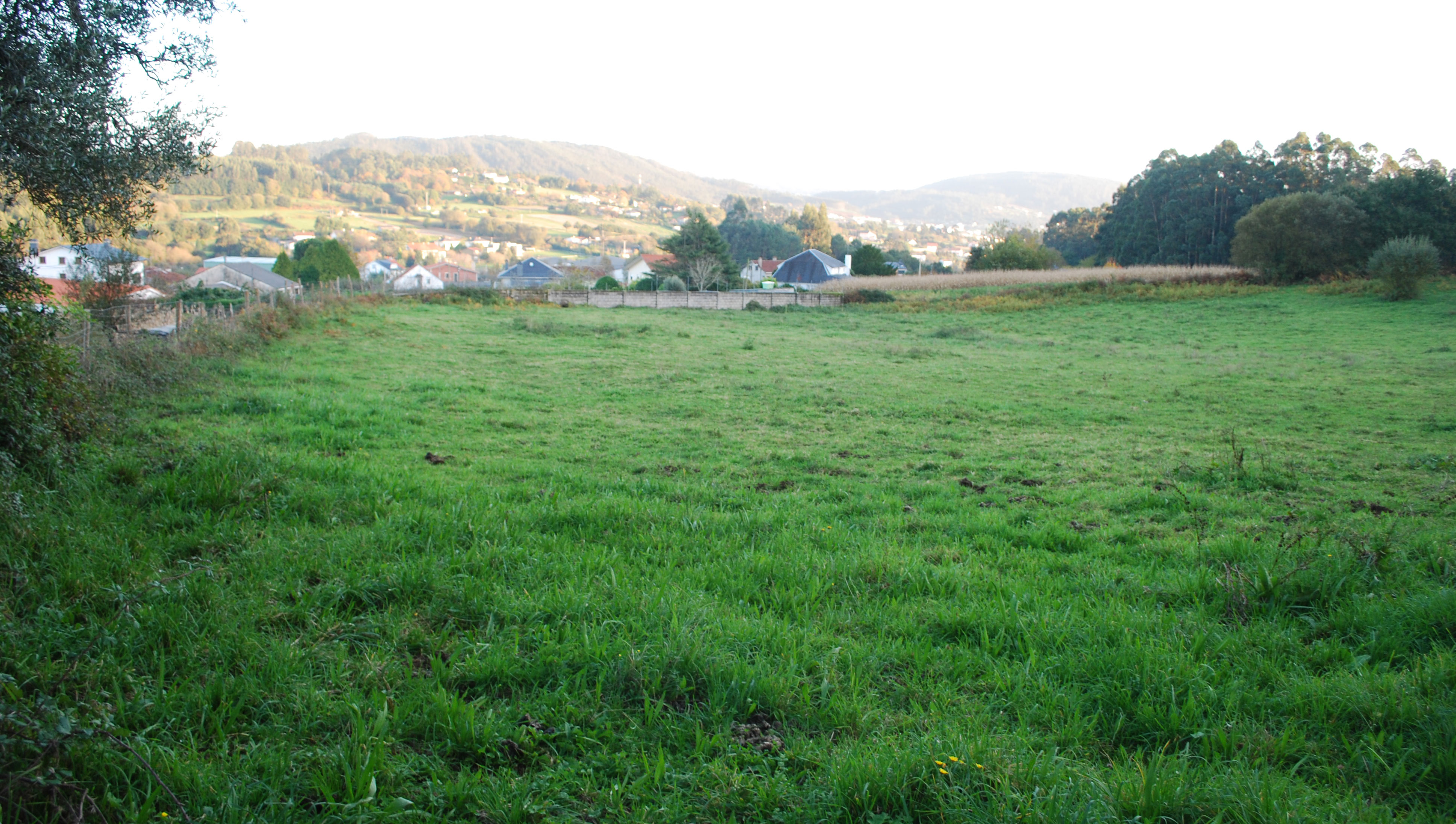 Vista dende o acceso ao castro de sequeiro en san xiao de narón a coruña galiza spain